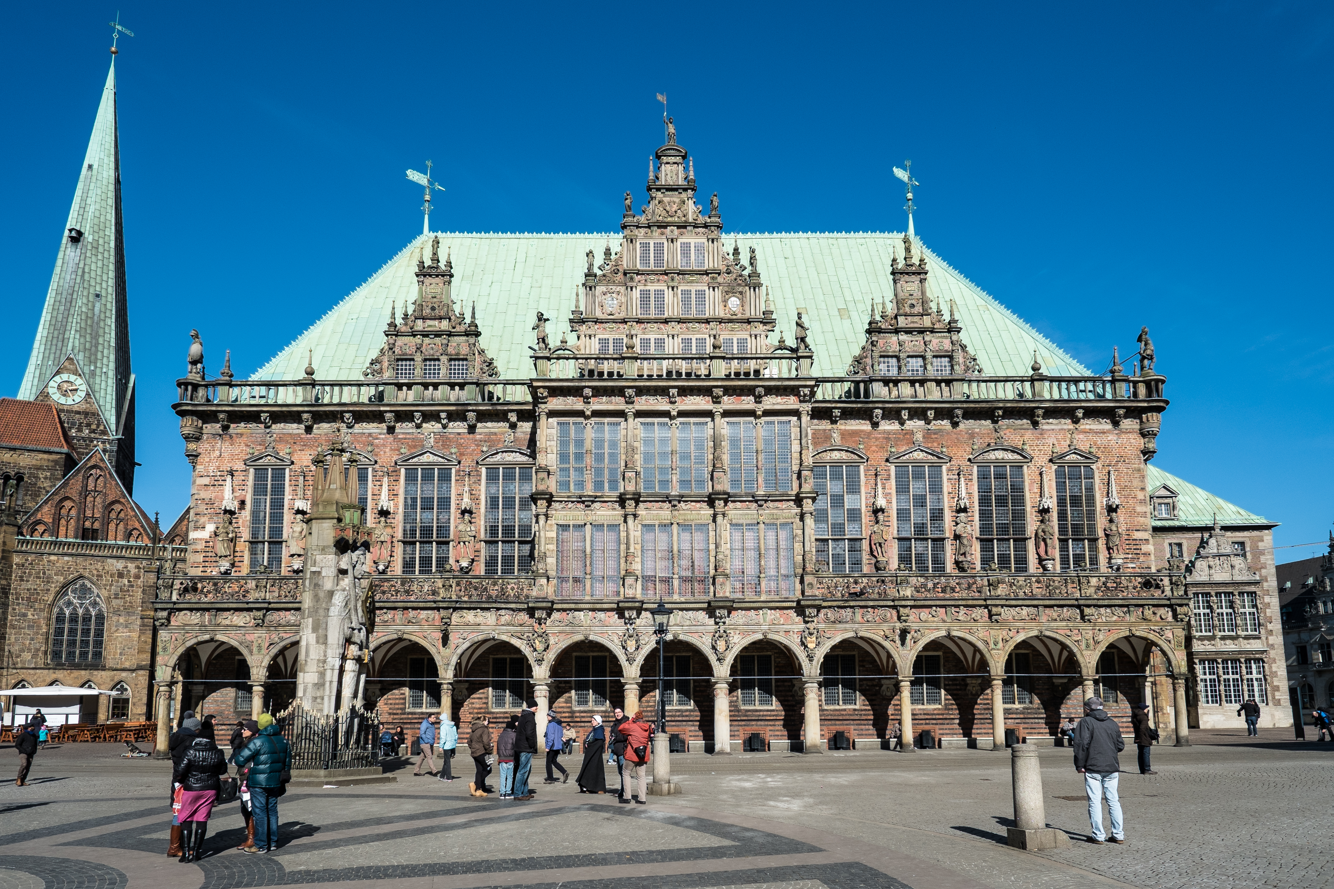 Das Rathaus